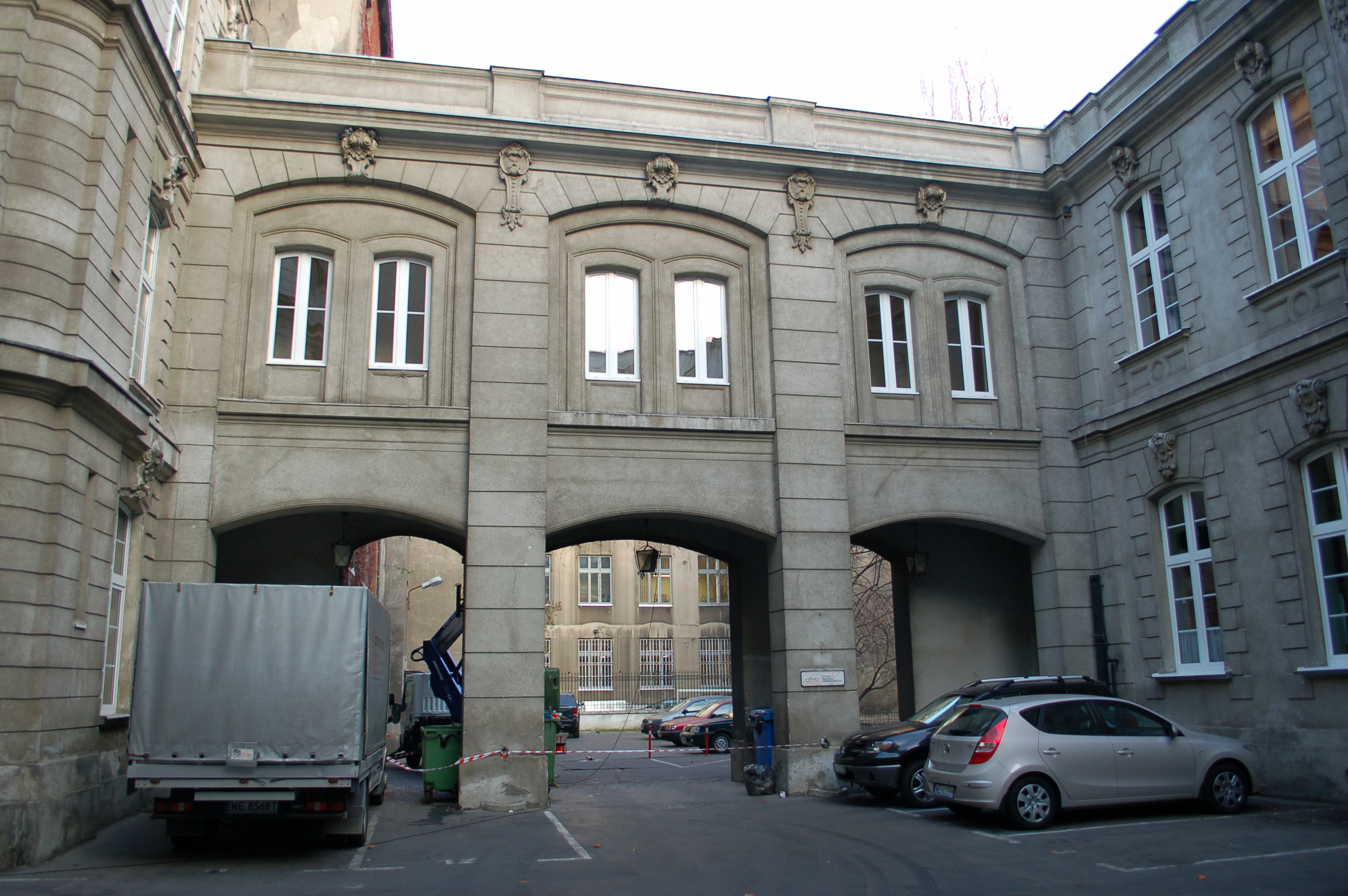 Ulica Kredytowa, Warszawa